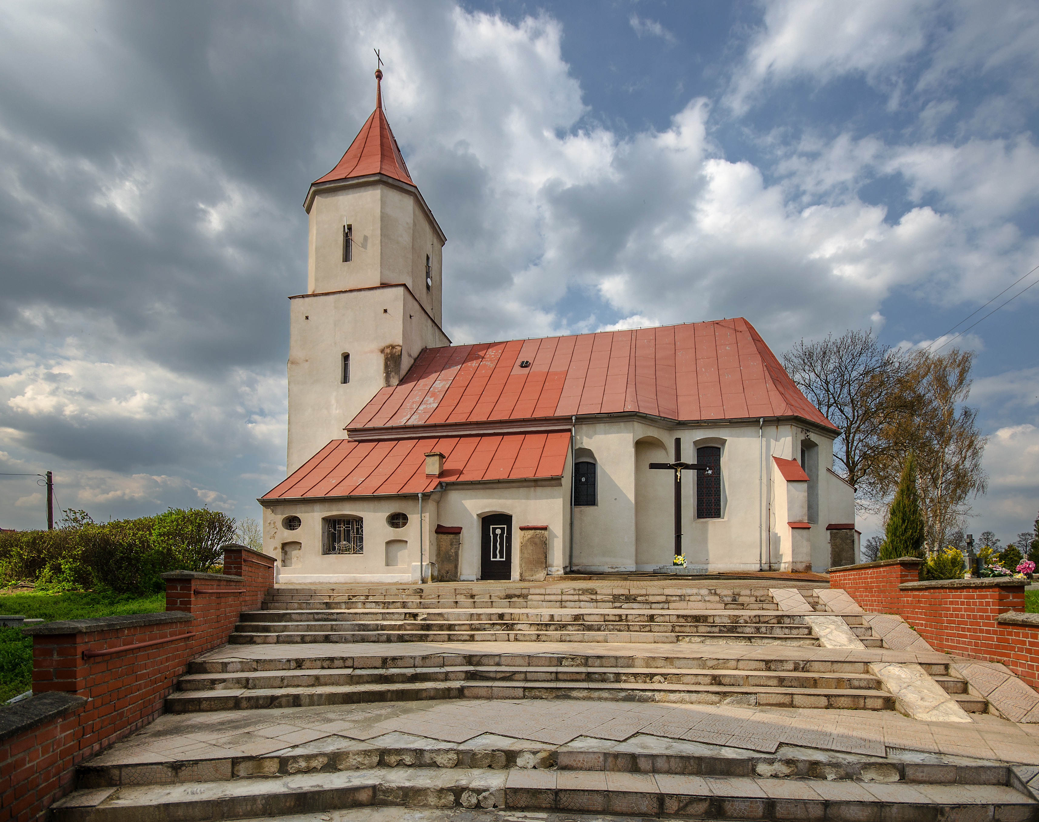 Gorzyca, kościół fil. p.w. św. Józefa, XIV, XVII